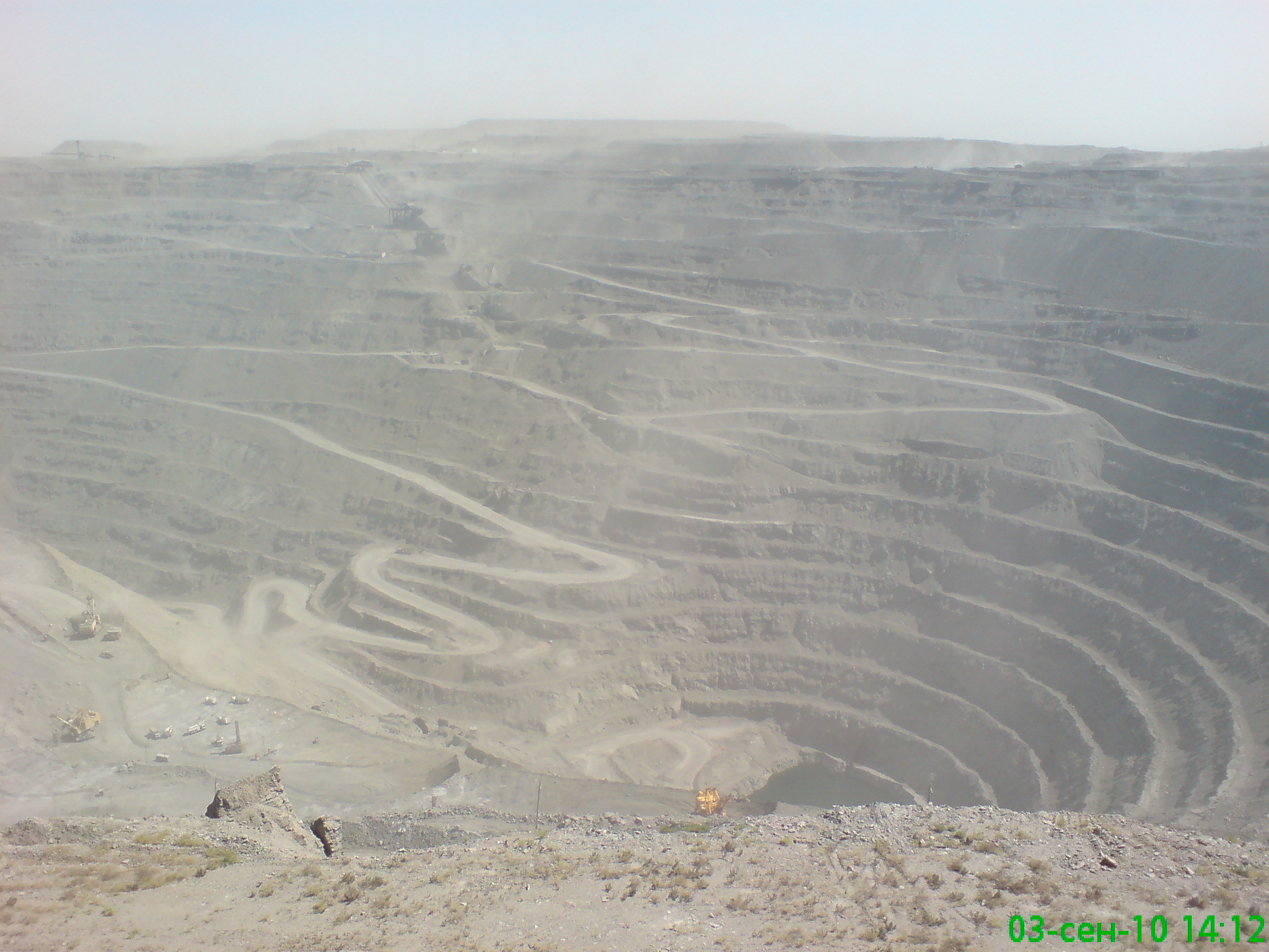 Мурунтау, самый большой золотой карьер в мире